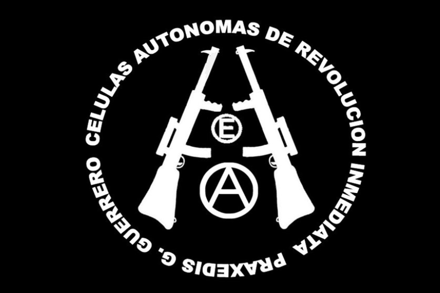 Logo usado por la guerrilla CARI-PGG